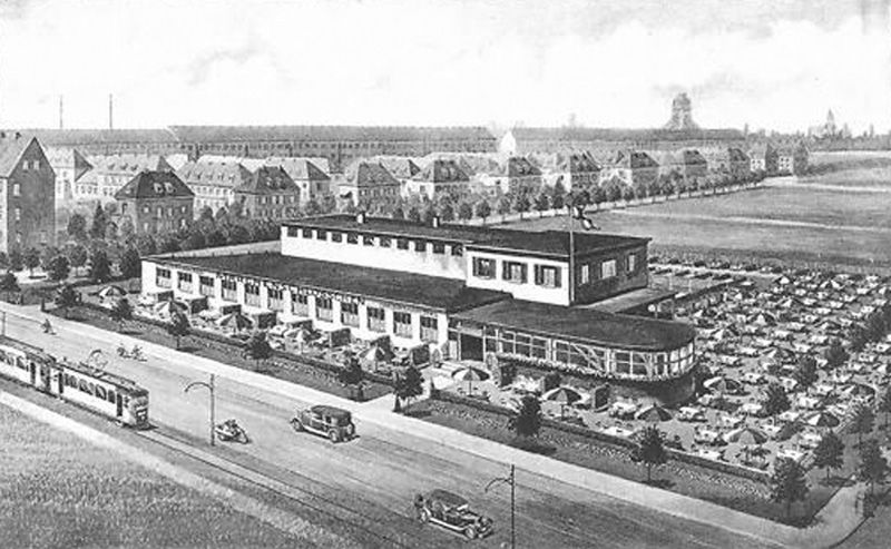 Gaststätte Märchenschlösschen in Leipzig-Marienbrunn, um 1935